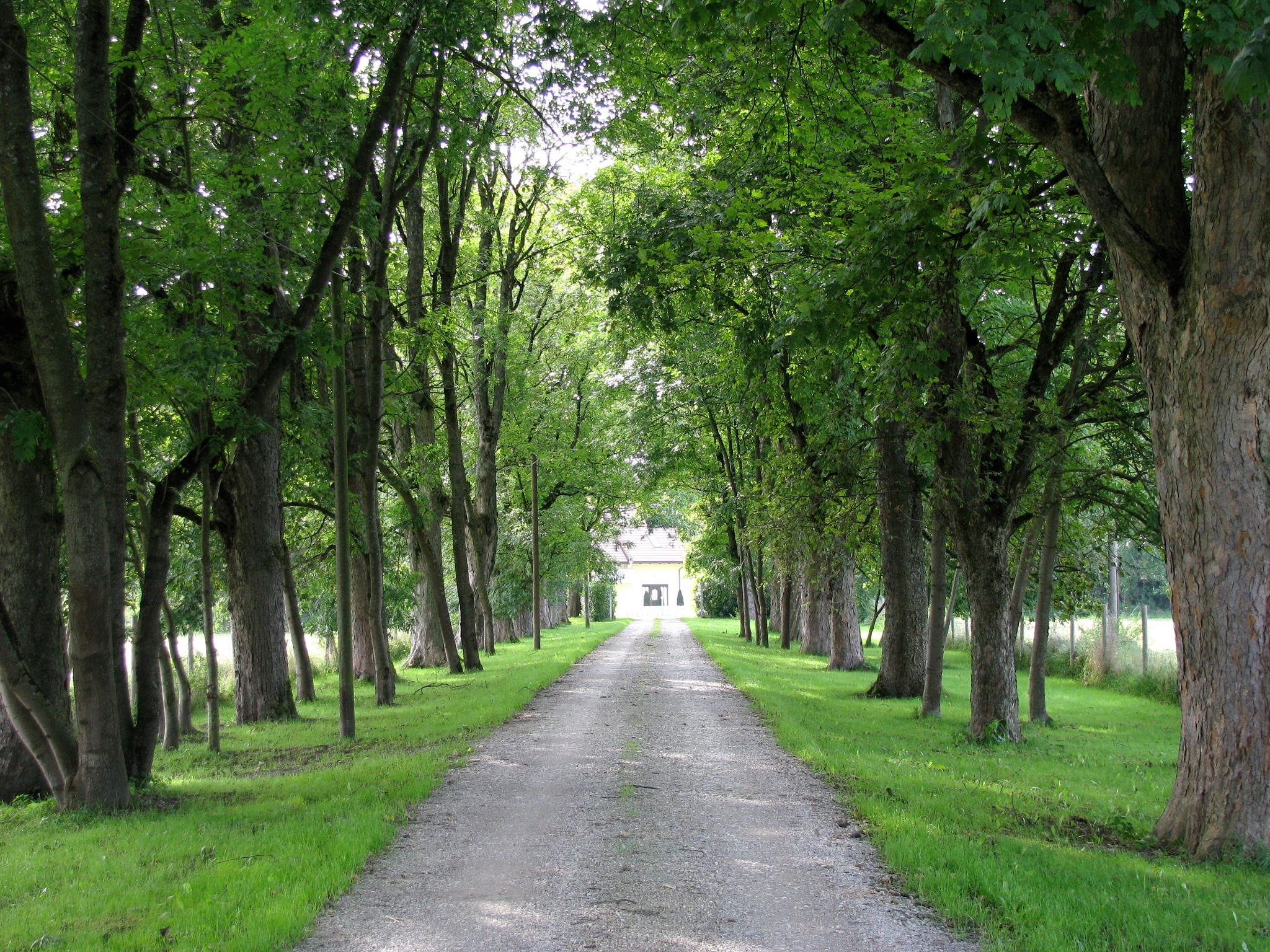 Allee zum Gutshof Moosschwaige im Münchner Stadtteil Aubing